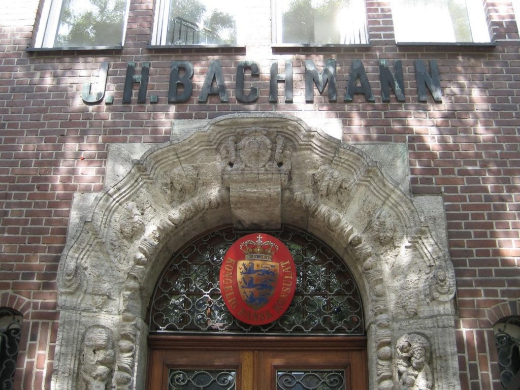 Teilbereich des Eingangsportals des „Bachmann-Hauses“ an der Schlachte 15–18 in Bremen. Früheres Kontorhaus der ehemaligen Bremer Handelsspedition J.H. Bachmann, 1913 erbaut und nach Kriegszerstörungen 1948 in der alten Form wiederaufgebaut. Über dem Portal befindet sich noch der Firmenname des seit 2006/07 nicht mehr bestehenden Unternehmens. In dem Gebäude befindet sich das dänische Honorarkonsulat für die Freie Hansestadt Bremen (siehe Konsulatsschild im Bogen des Eingangsportals).